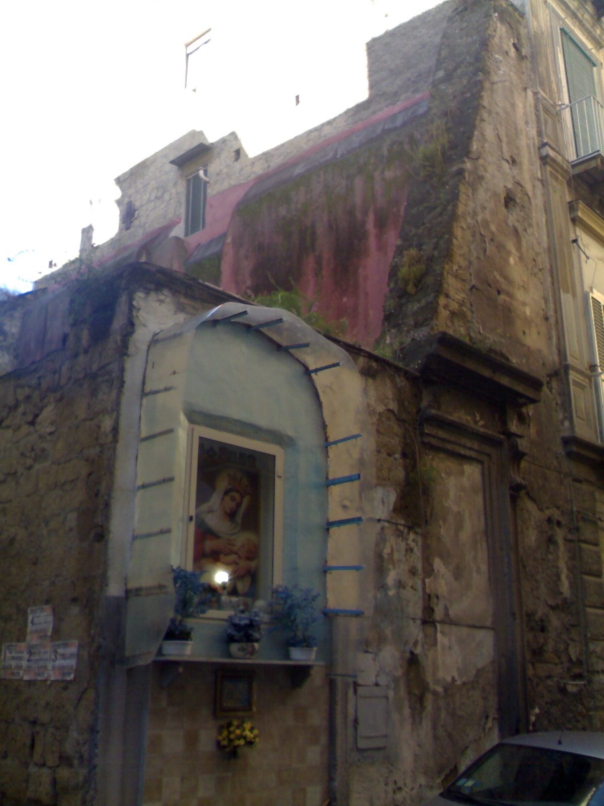 Chiesa di Santa Maria a Cancello (alcuni resti, Napoli)